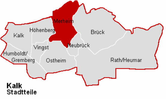 Lagekarte Merheim im Stadtbezirk Köln-Kalk